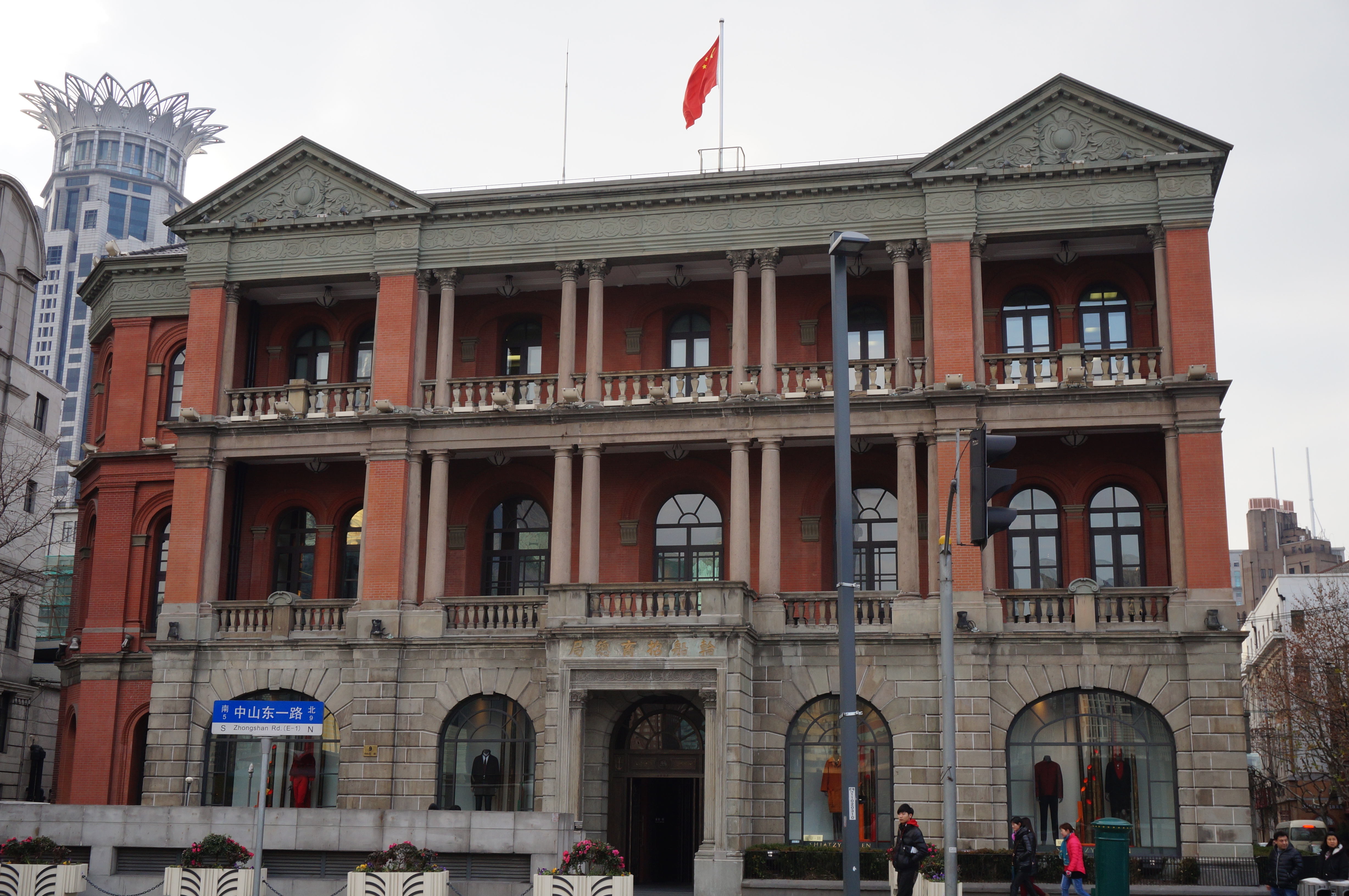 中文（中国大陆）: 轮船招商局大楼